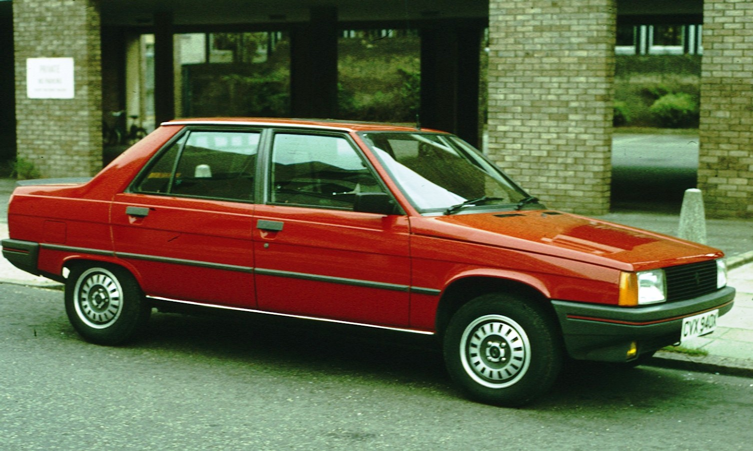 1982 Renault 9 Seitenansicht